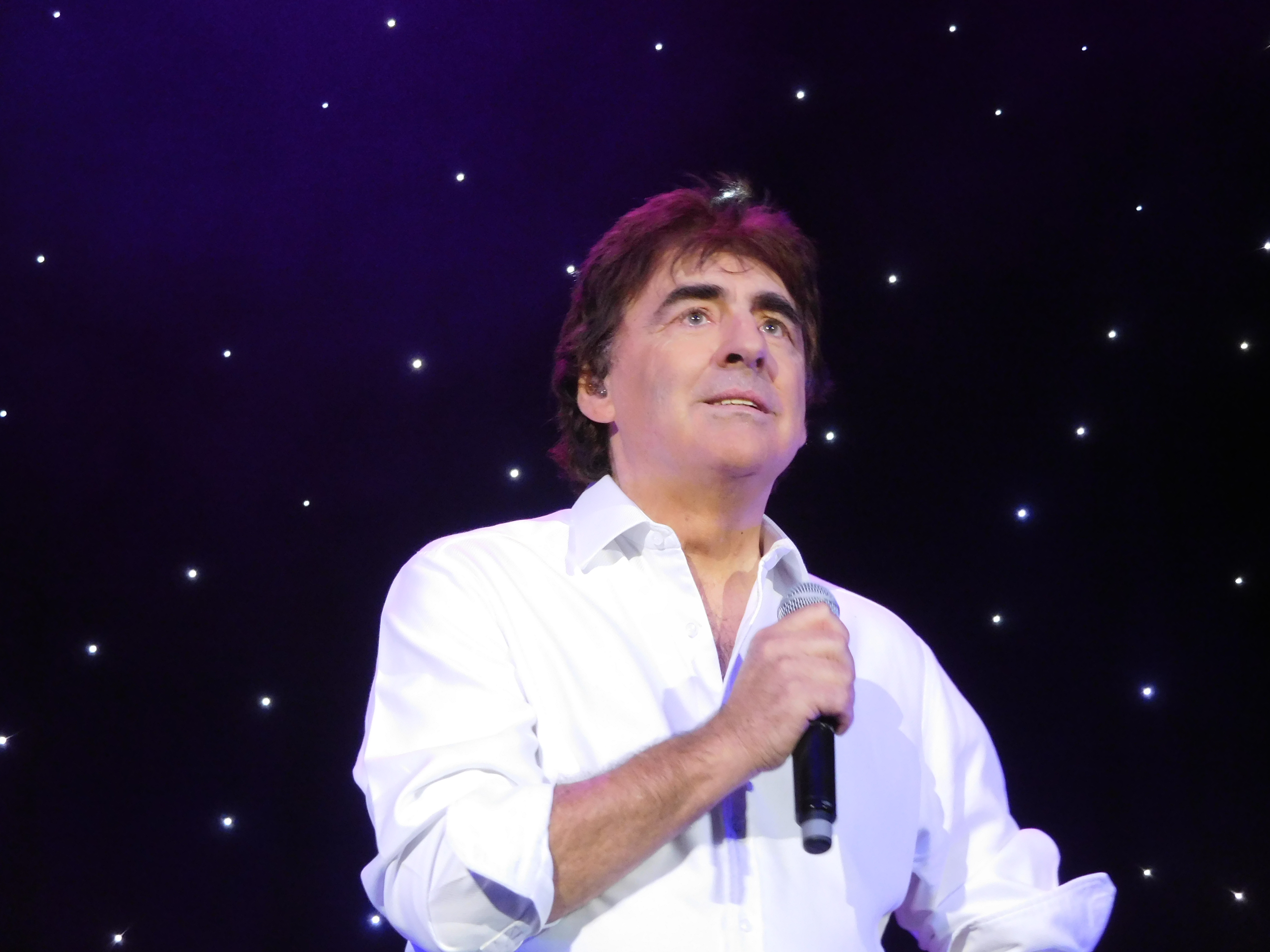 Claude Barzotti sur la croisière Age Tendre 2017